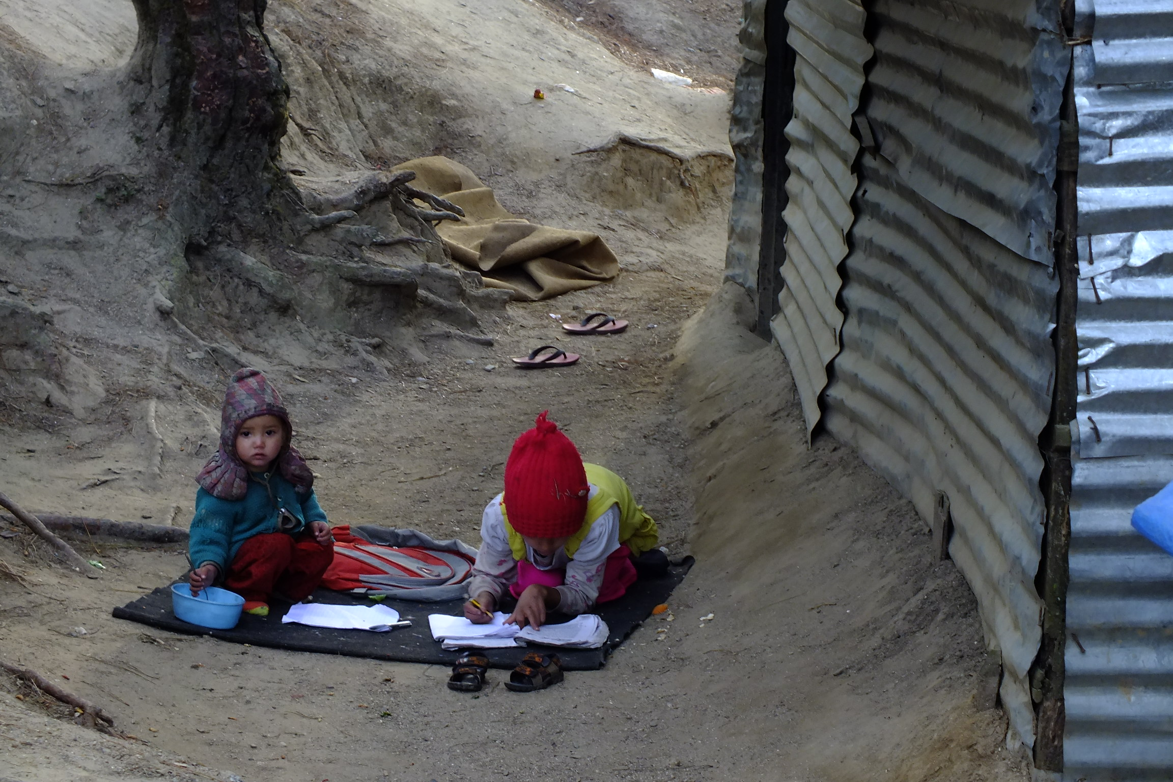 2015-03-18 Nagarkot